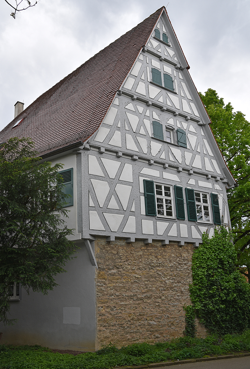 Ostflügel von Schloss Oßweil von Nordosten